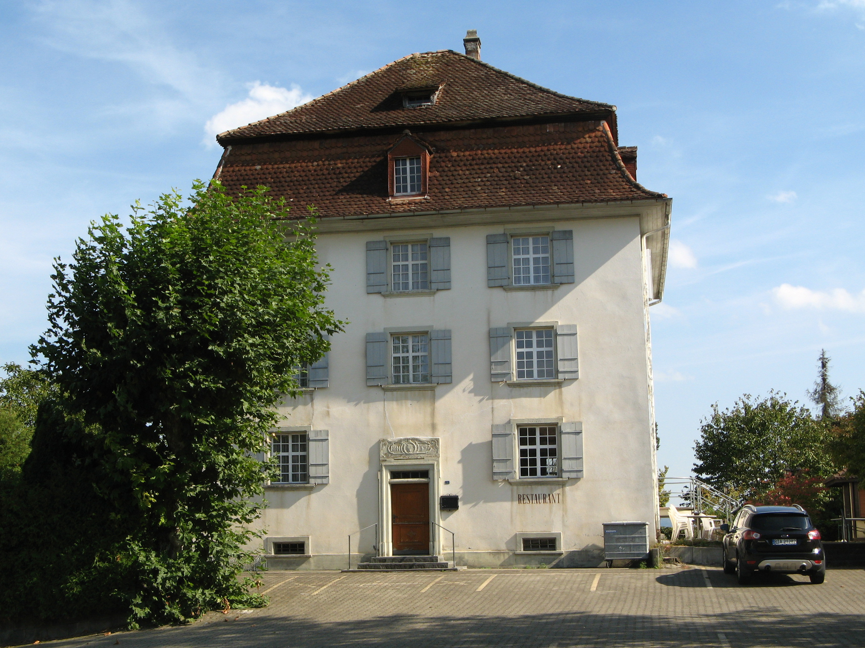 Vorderansicht des Aristauerhofs in Aristau